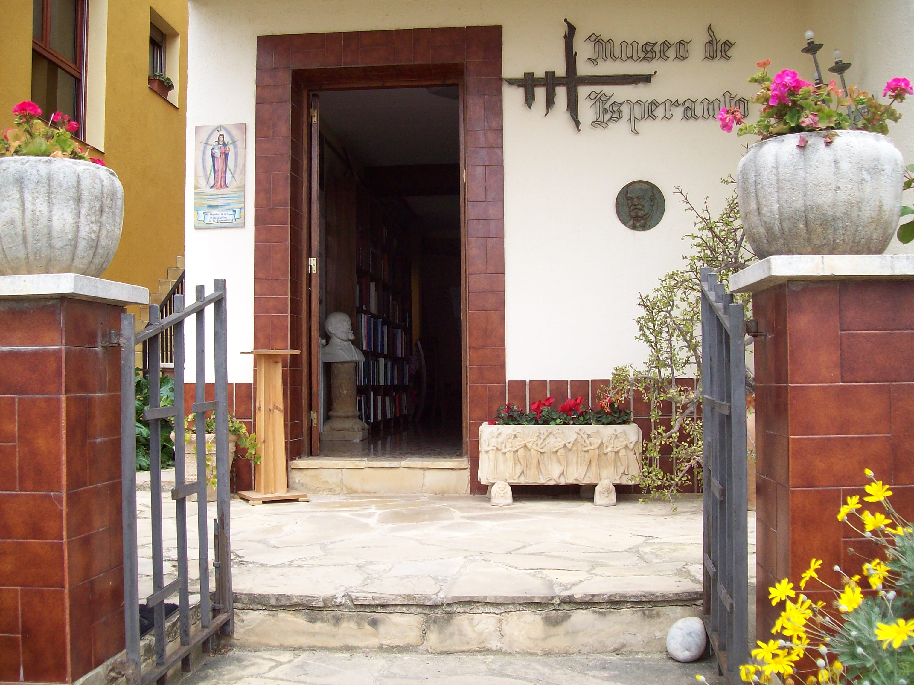 Entrada del Museu d'Esperanto de Subirats